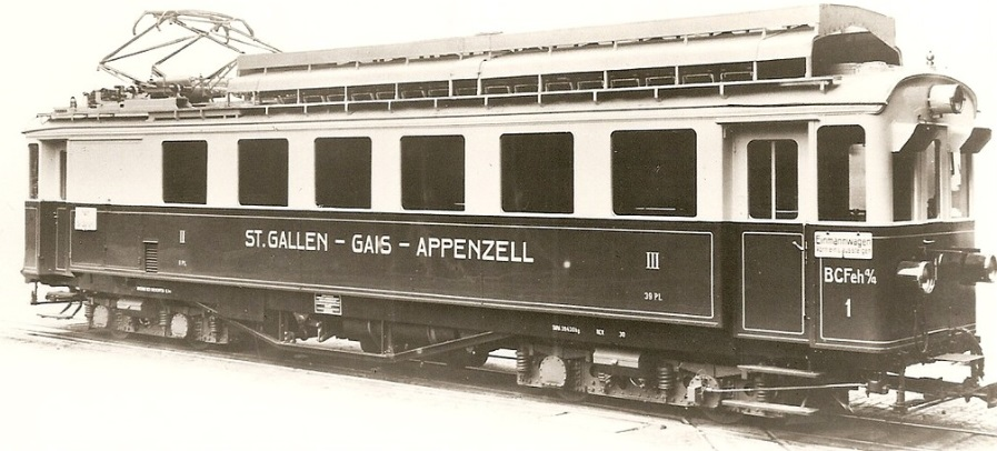 Werkaufnahme des BCFeh 4/4 1